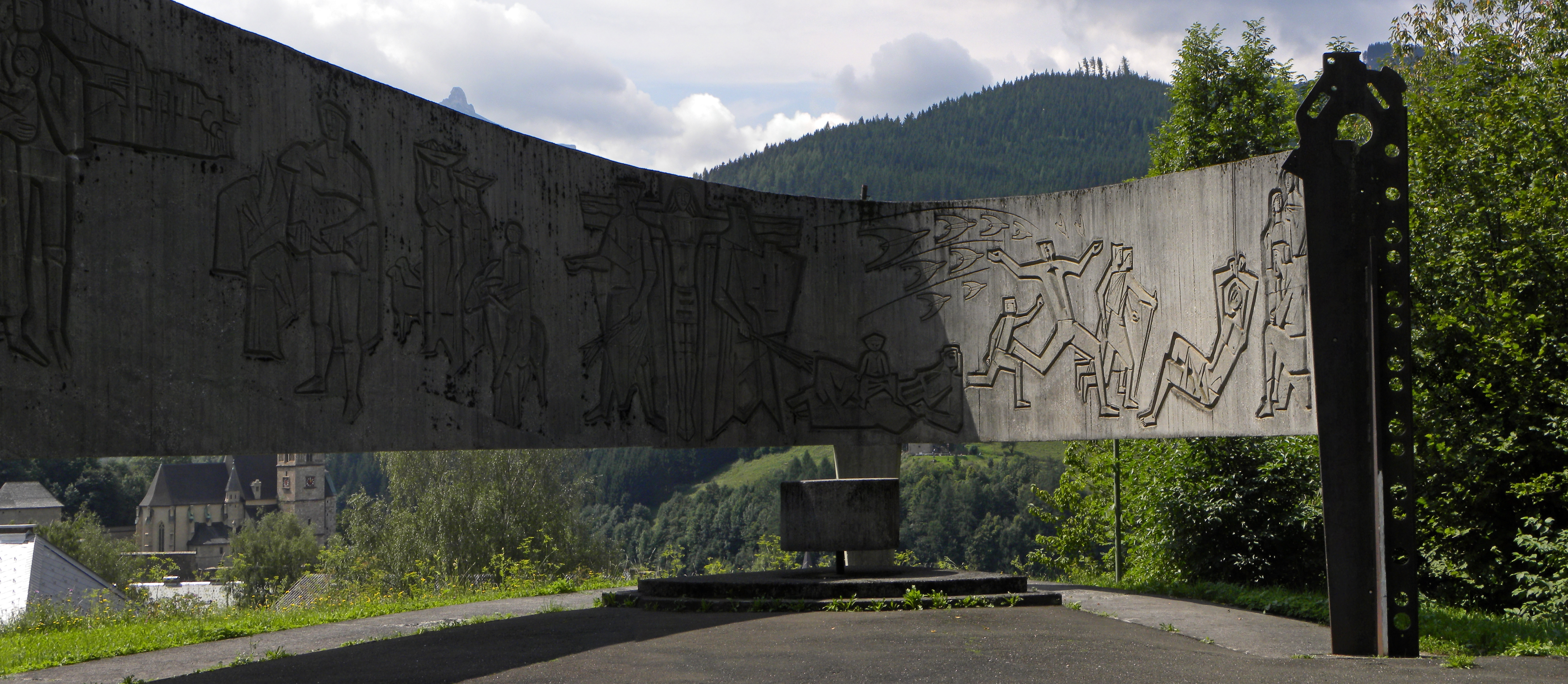 Kriegerdenkmal bei der Föhrenstraße in Eisenerz